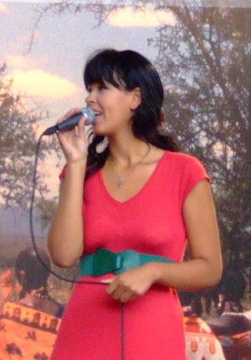 Maria Mena, Norwegian Artist